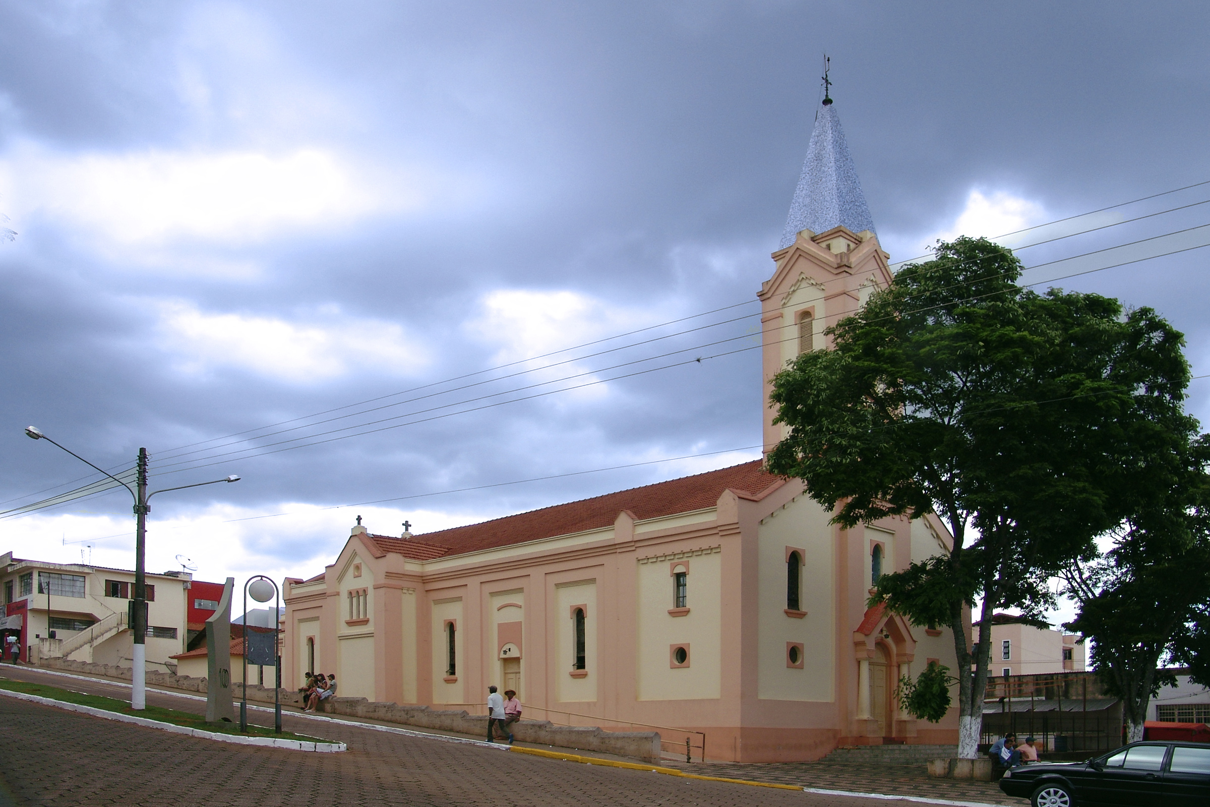 Igreja no município de Itaberá, São Paulo, Brasil